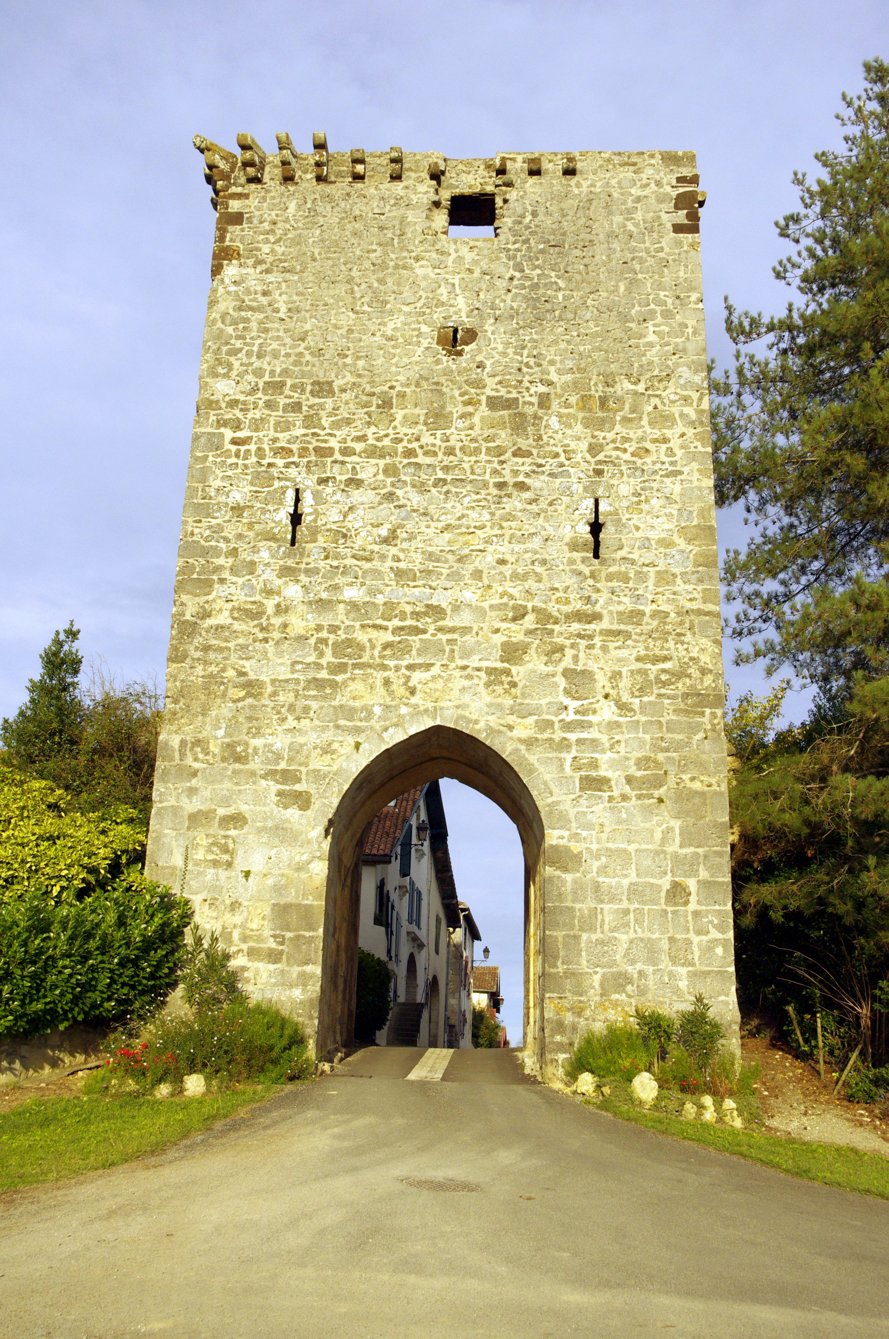 Hastingues, la porte de la ville